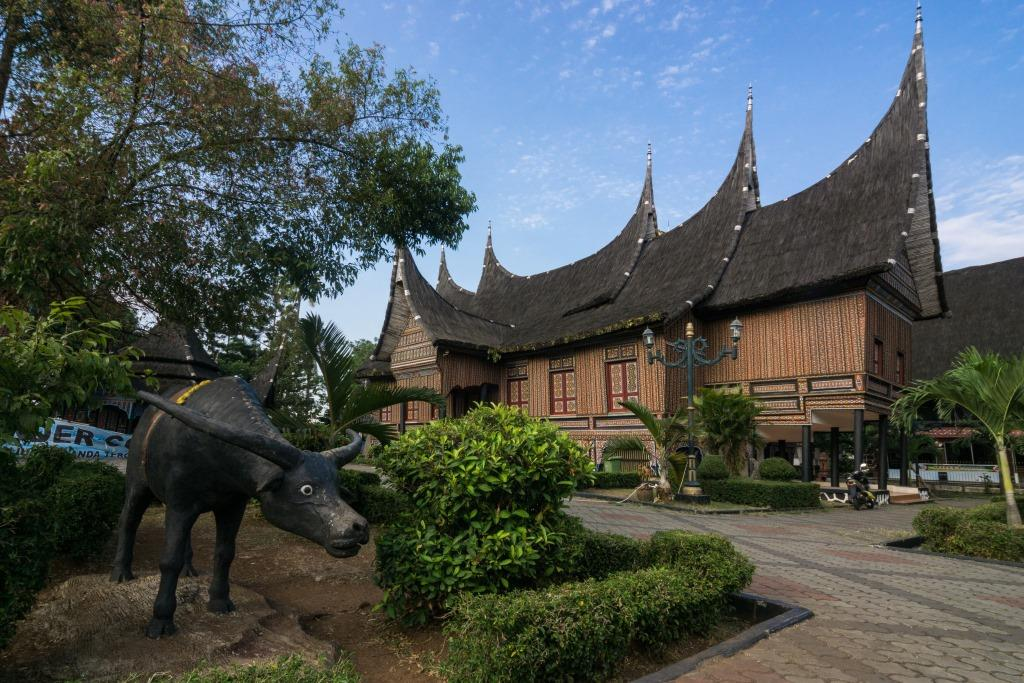 Anjungan Sumatra Barat TMII Jakarta